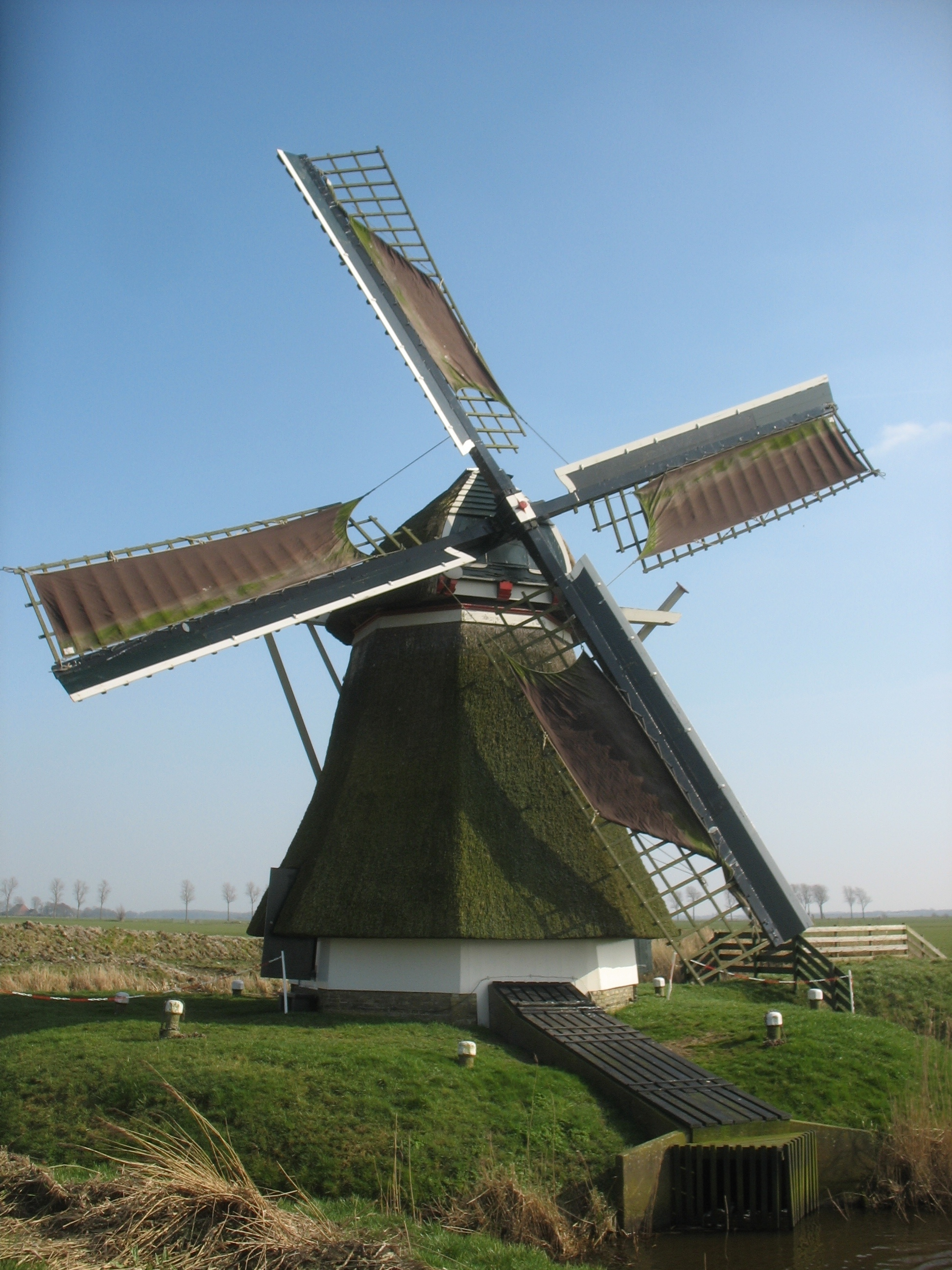 Dit is een afbeelding van poldermolen Beintemamolen, bij Westergeest.